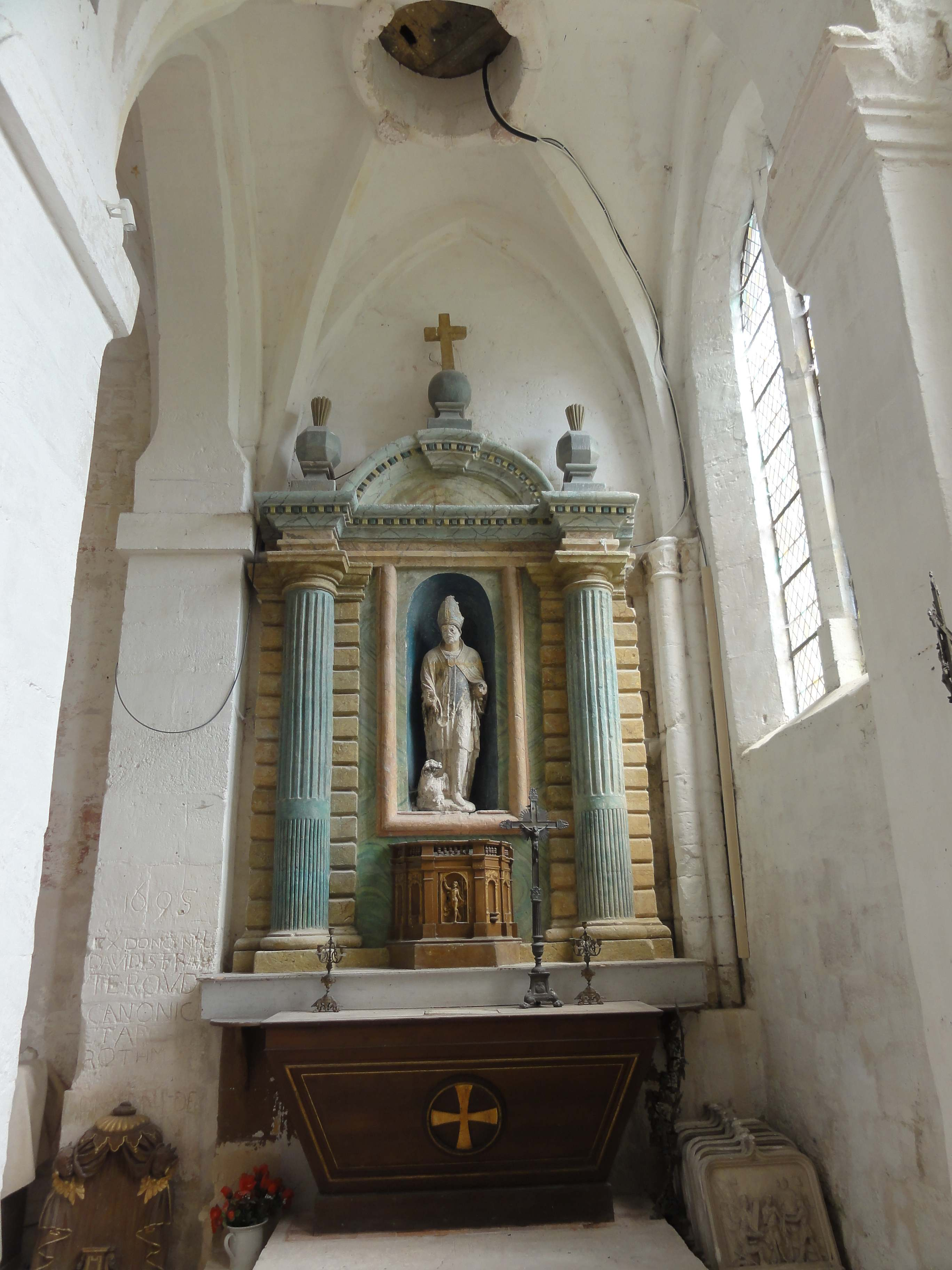 Mobilier de l'église (voir titre).